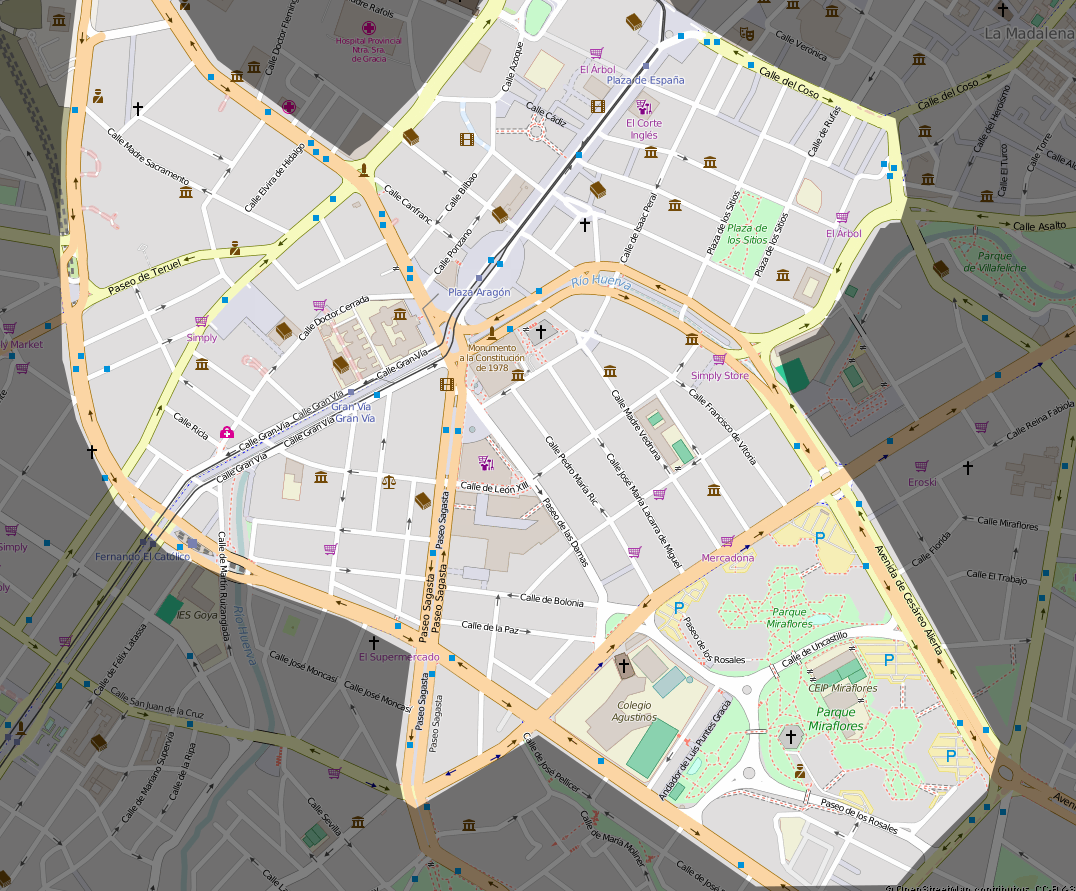 Mapa del distrito Centro en Zaragoza.